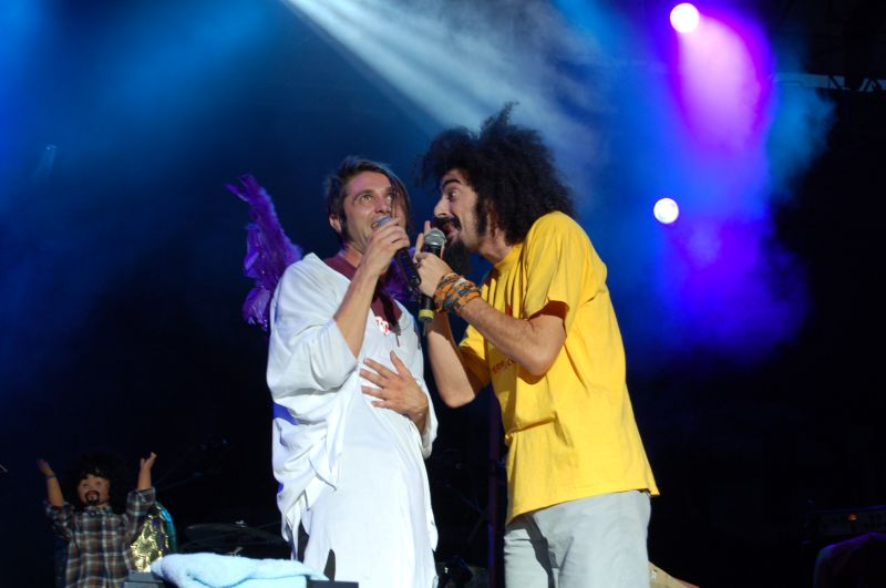 Diego Perrone (a sinistra) e Caparezza (a destra) al Traffic Festival del 2006.